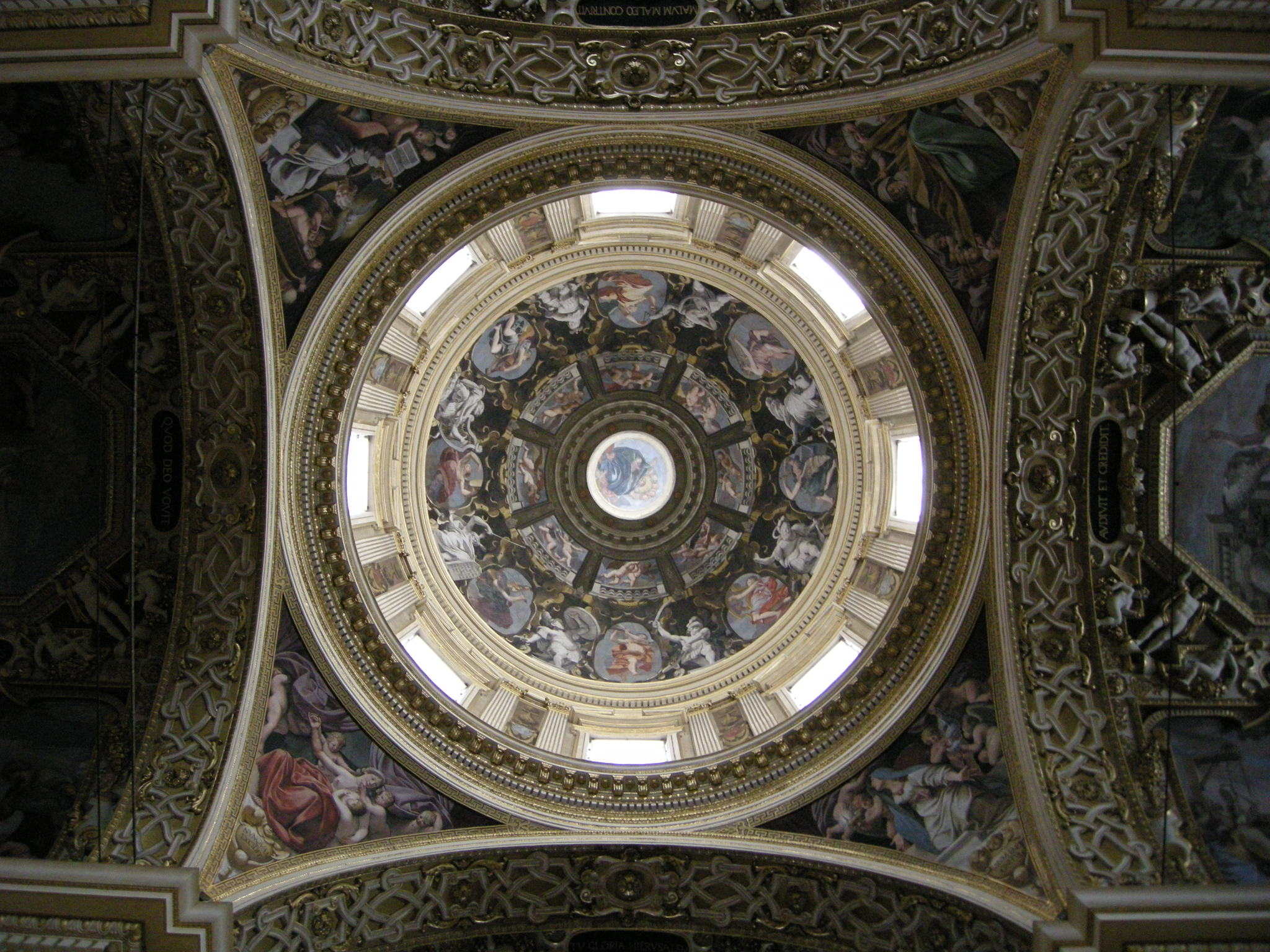 Madonna della Ghiara, interno, soffitto 07 cupola